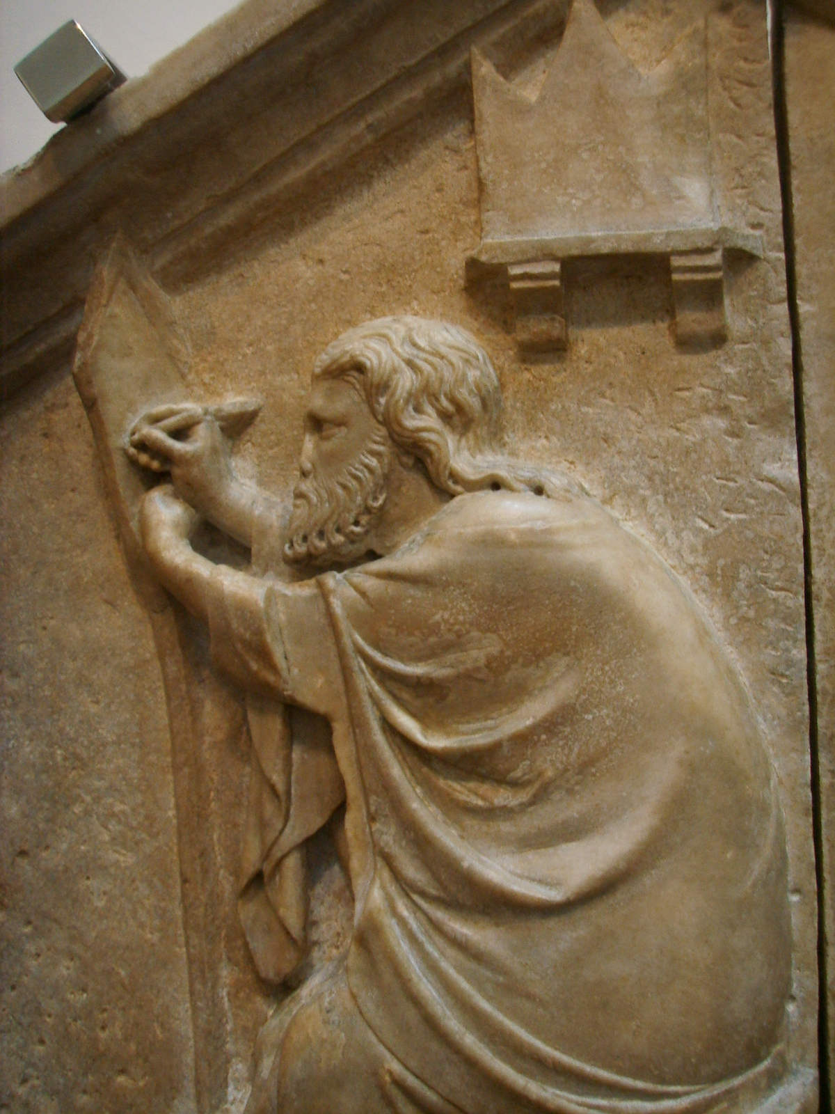 Formella 18, apelle o la pittura, nino pisano, 1334-1336 dettaglio